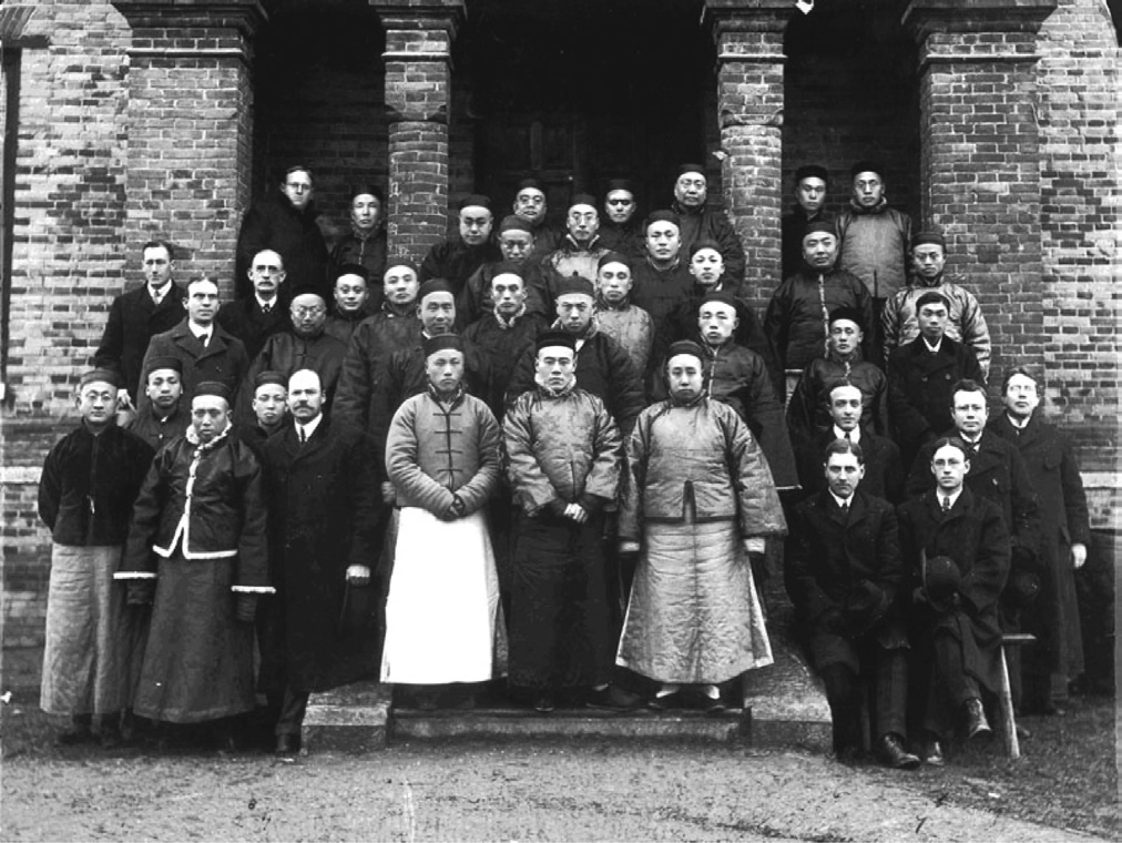 1897年两江总督张之洞率众官员视察汇文书院时和汇文书院中外教职员于三层楼洋房（钟楼）前合影。